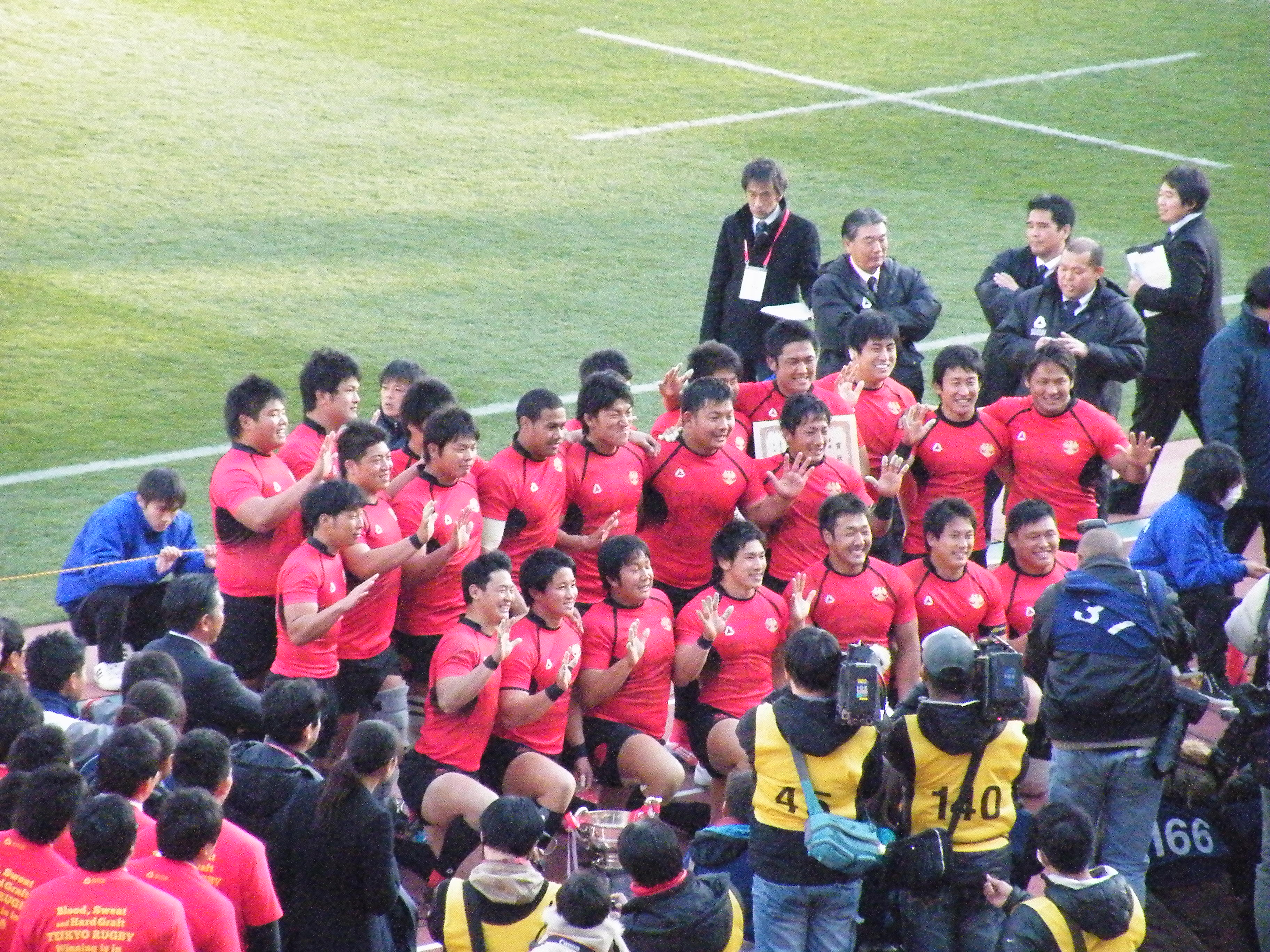 第50回全国大学ラグビーフットボール選手権大会決勝戦の様子